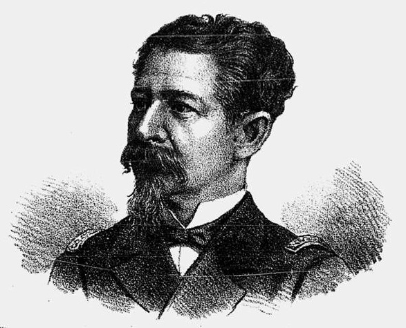 General Enéas Galvão, Commandante em chefe. Os officiaes que comandaram as forças de terra contra os revoltosos da fortaleza de Santa-Cruz.